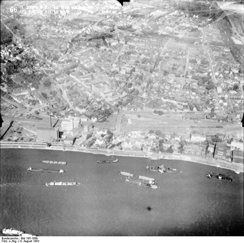 Rheinbefliegung der Alliierten 1953